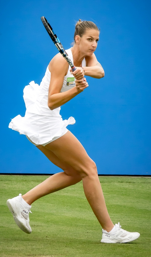 Pliskova